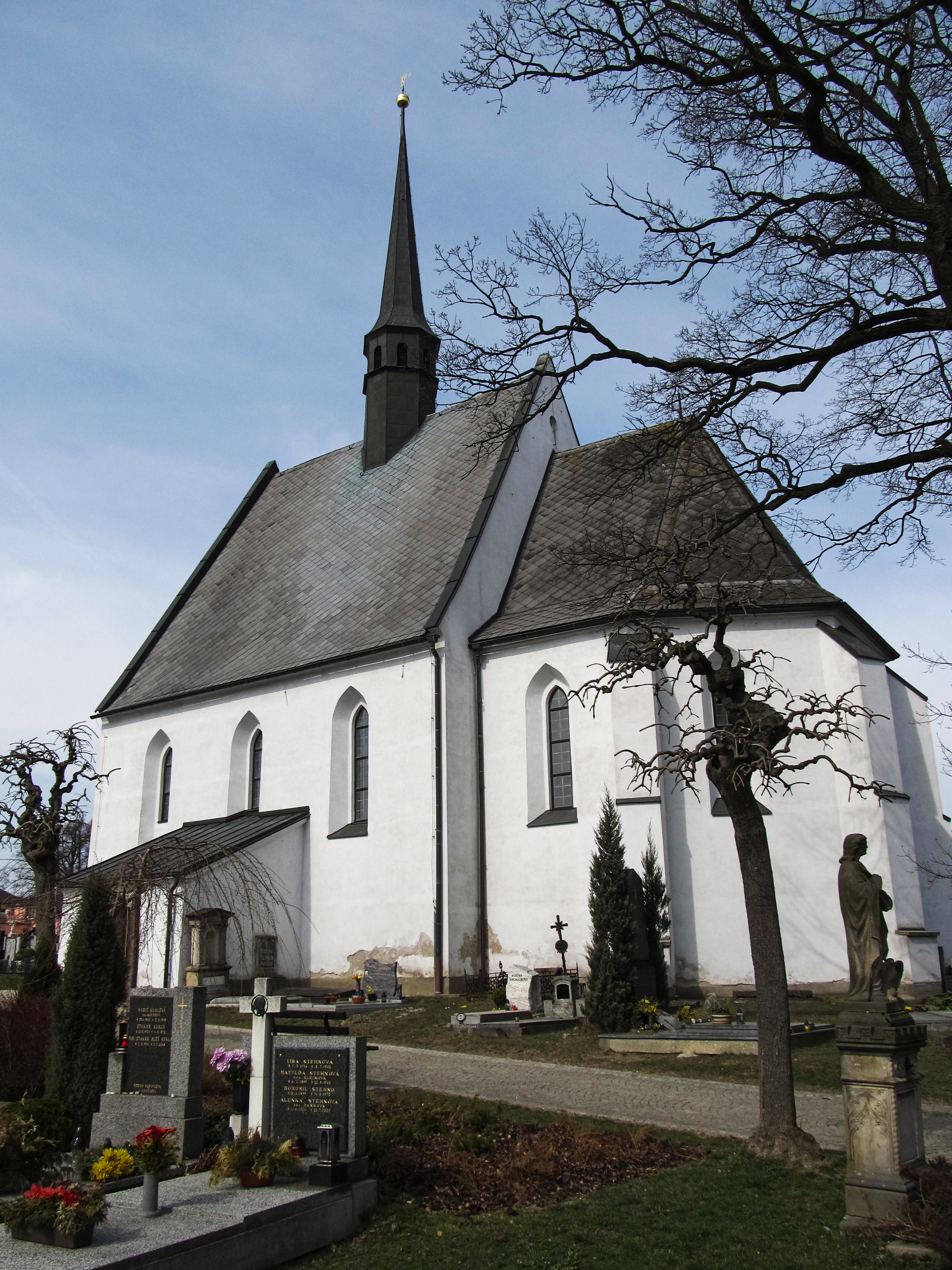 Renesanční hřbitovní kostel sv. Michaela archanděla (1572-1576), pohled od hřbitovní brány